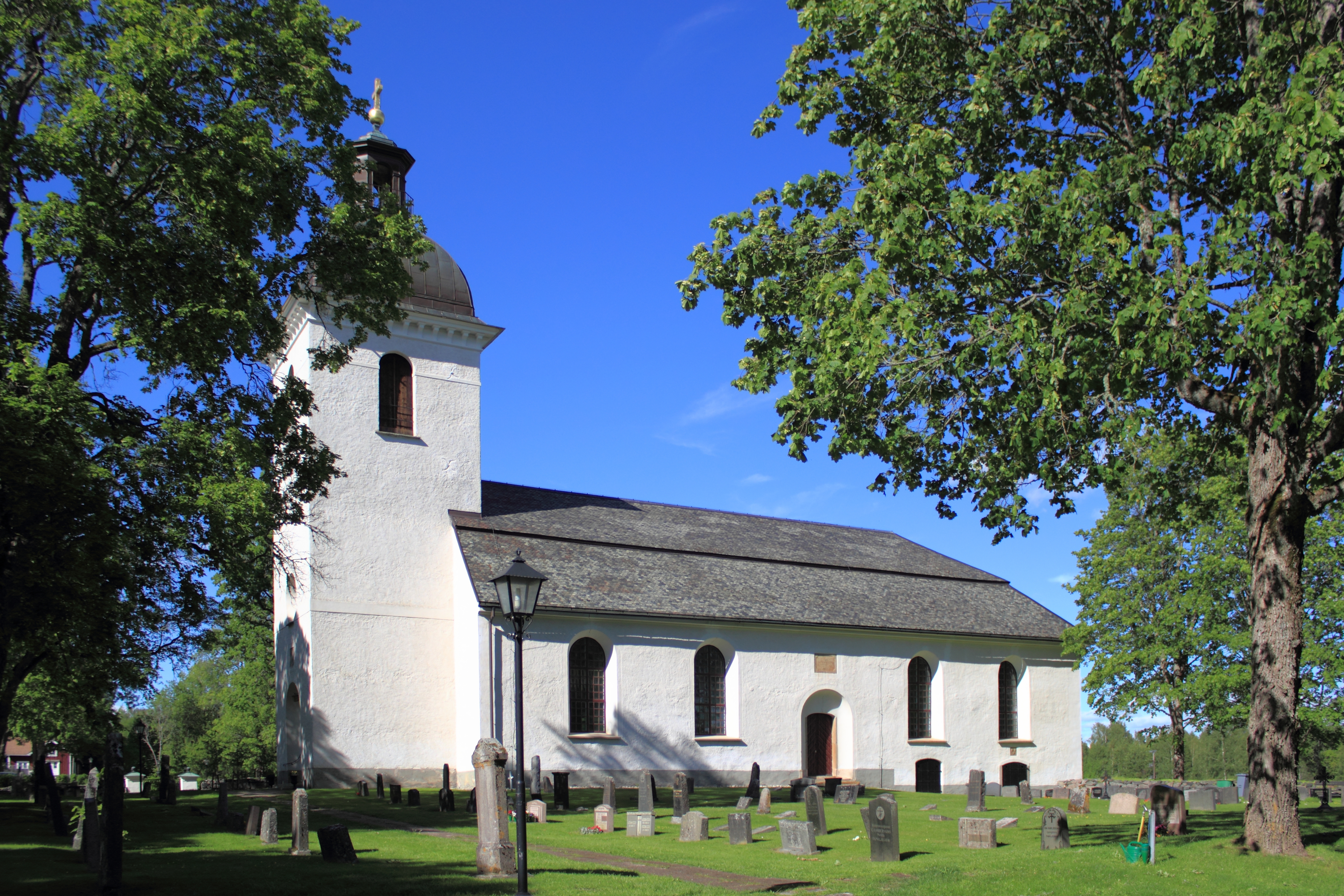 Lillkyrka kyrka, Strängnäs stift